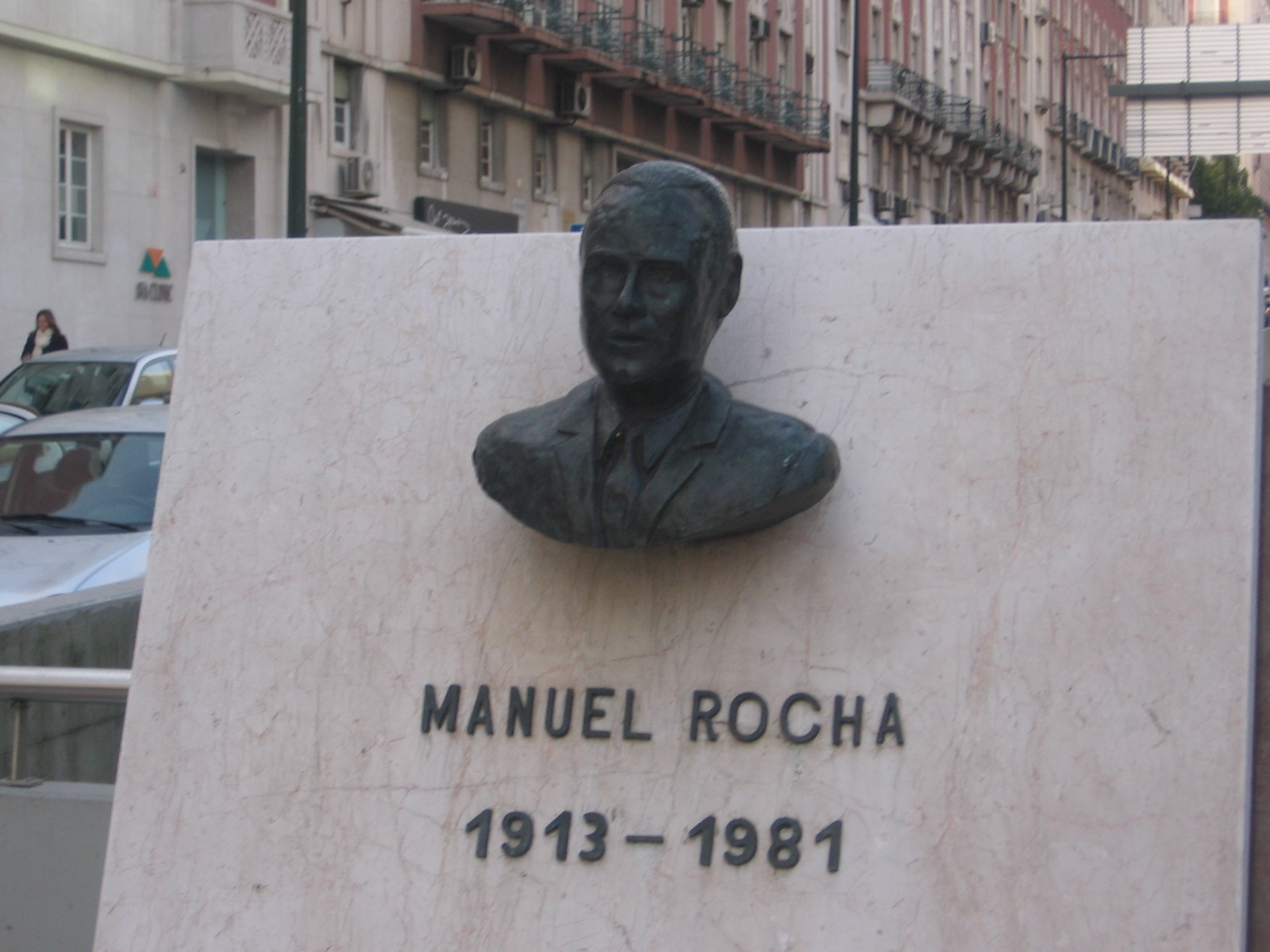 Busto do engenheiro Manuel Rocha, Avenida António Augusto de Aguiar frente à sede da Ordem dos Engenheiros, Lisboa, Portugal